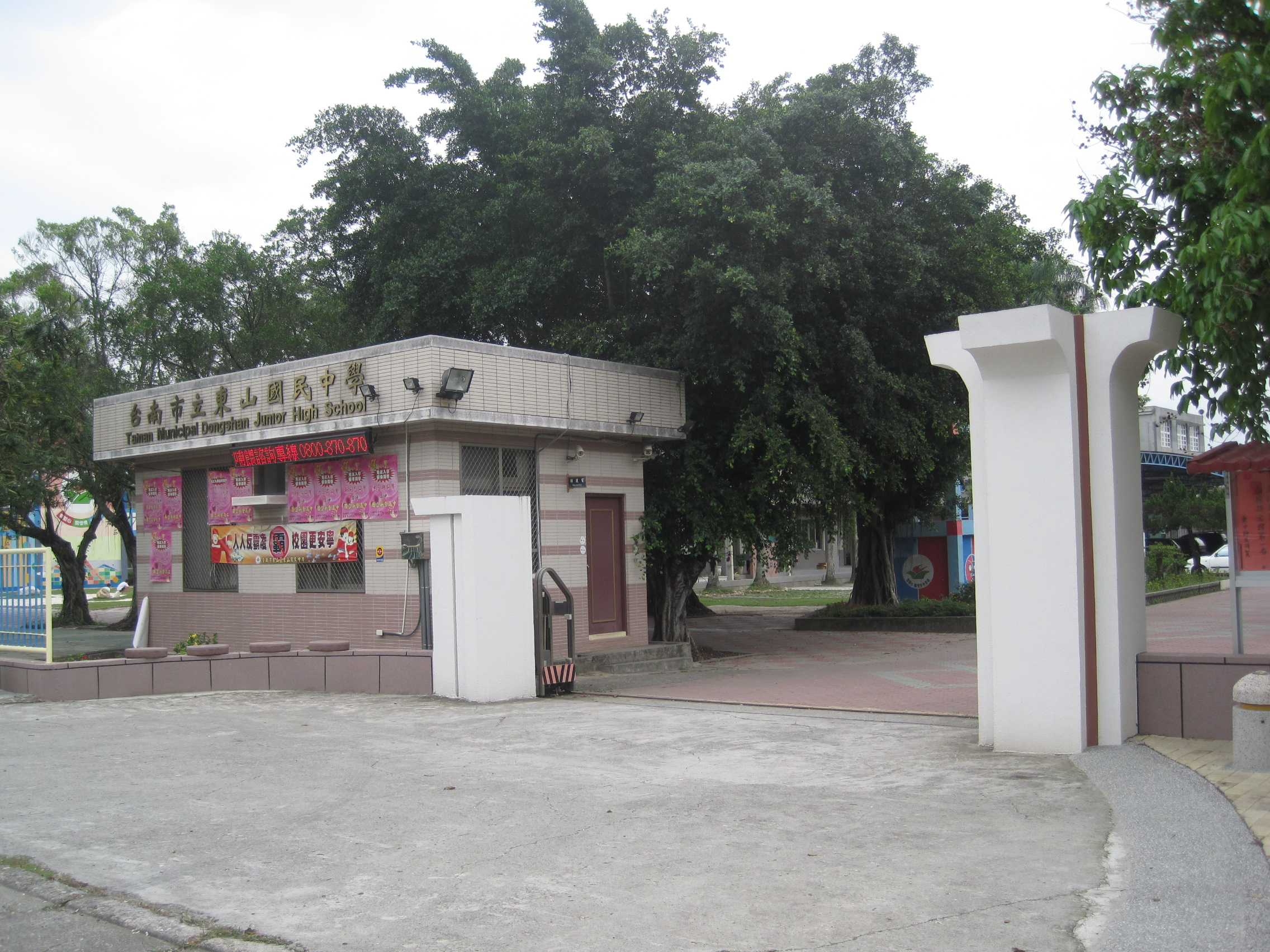 臺南東山區東山國中